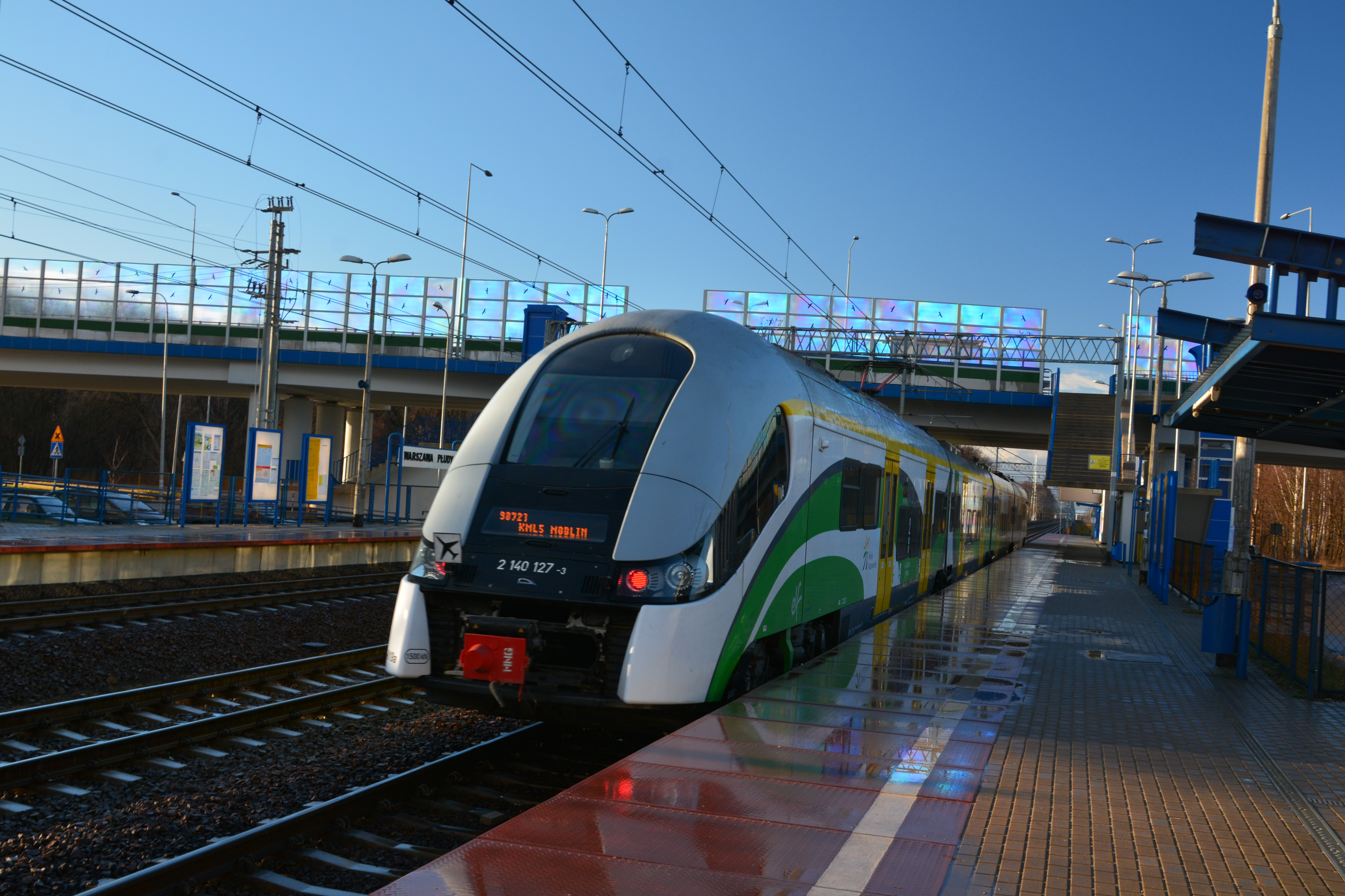 KML do Modlina na przystanku Warszawa Płudy